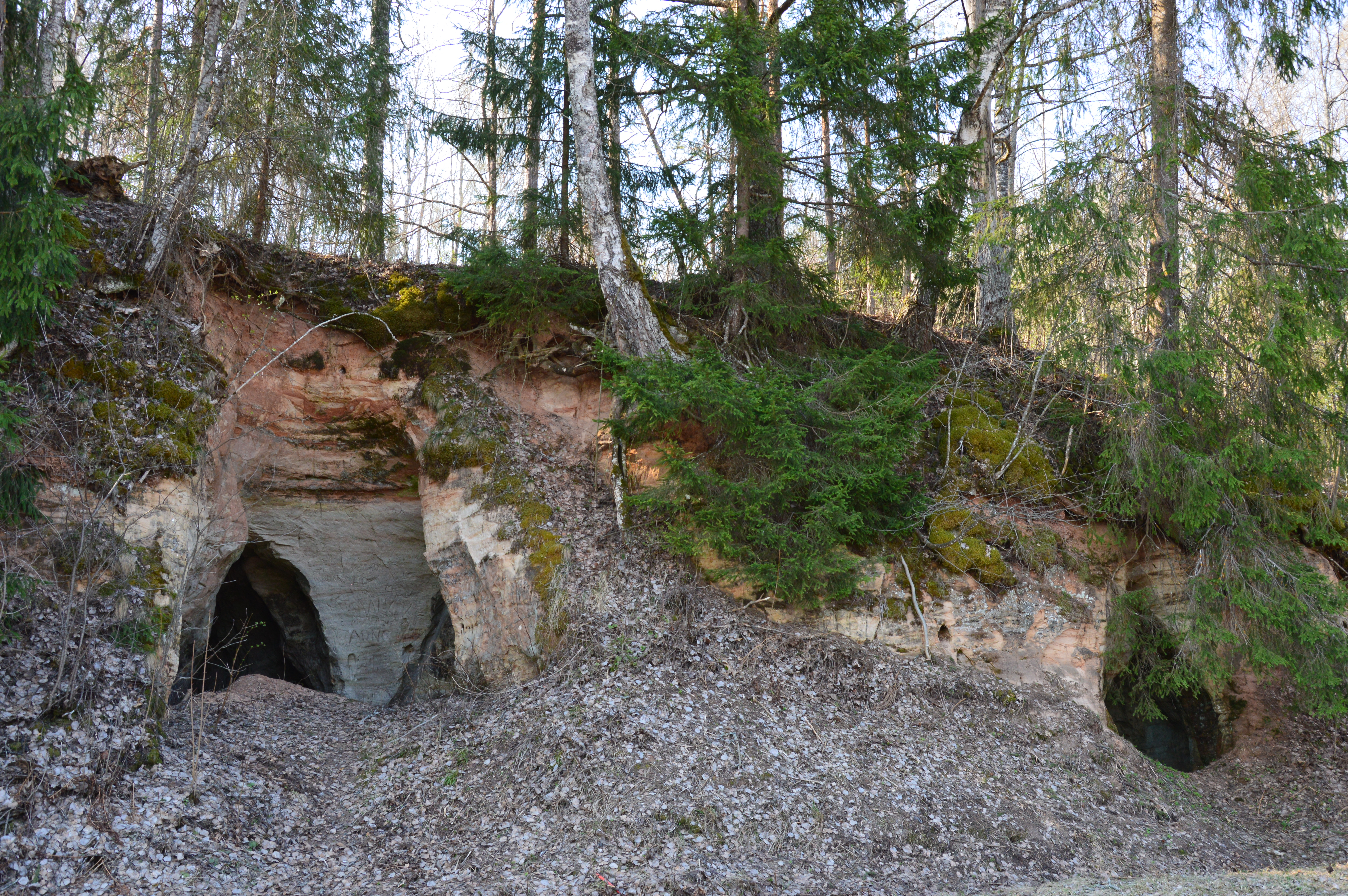 Kunnasilla koopad